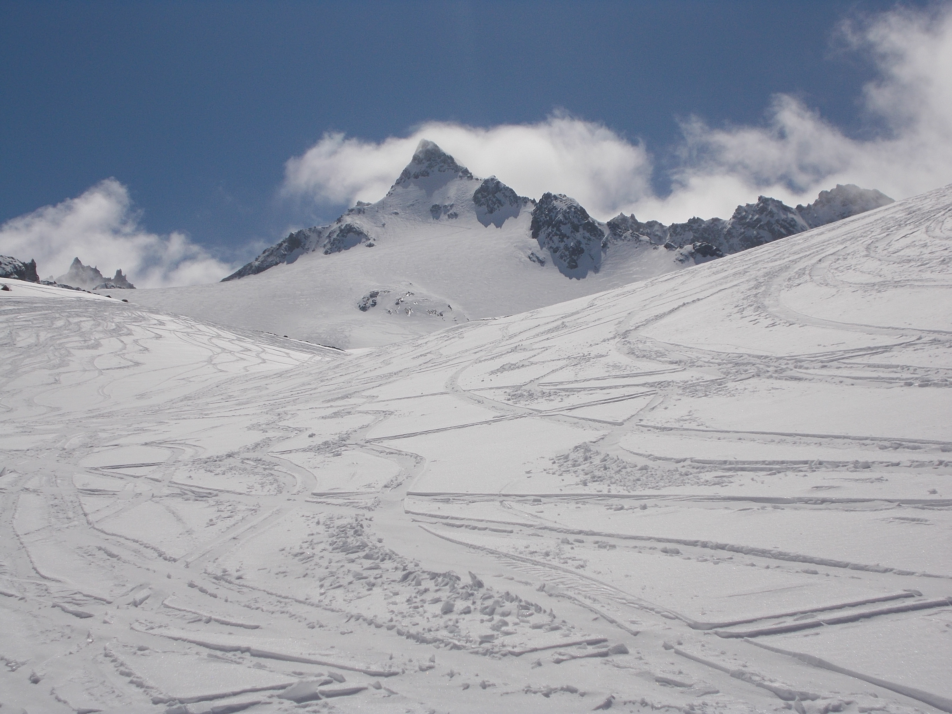 Dreiländerspitze von Norden beim Aufstieg über den Vermuntgletscher. Hintere Jamspitze links im Hintergrund